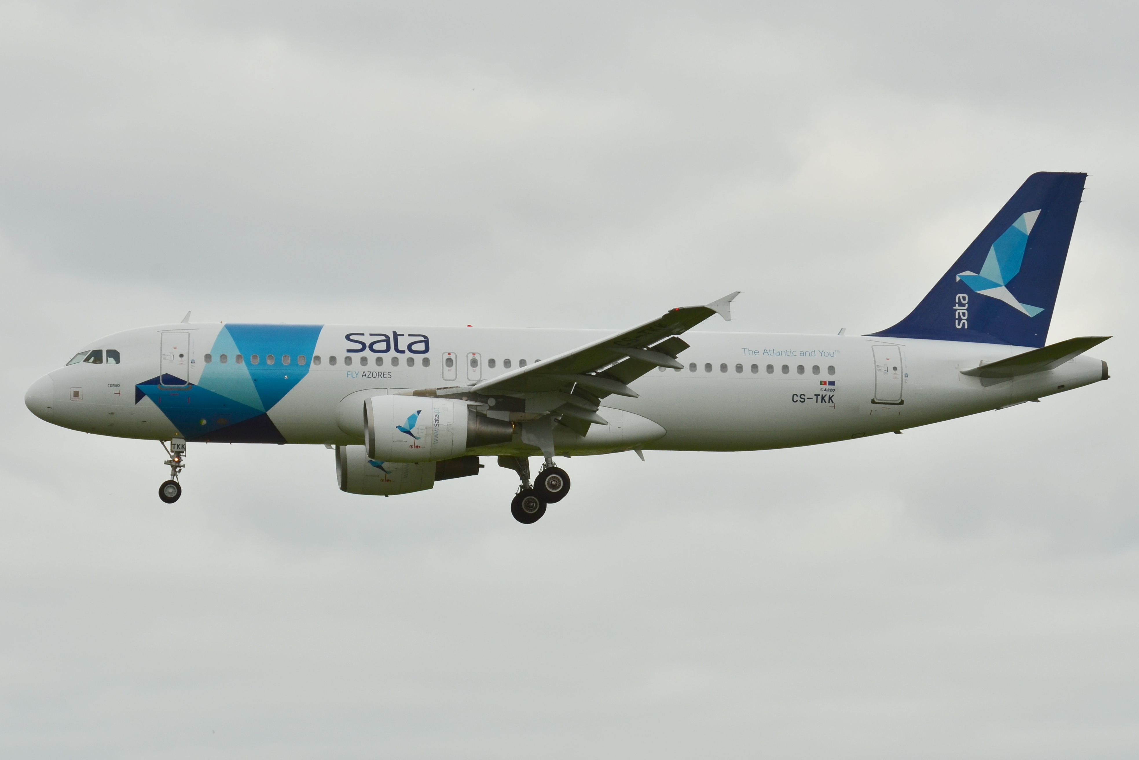 Photo prise à l'aéroport de Toulouse-Blagnac (LFBO) en France. Picture take at Toulouse-Blagnac Airport (LFBO) in France.